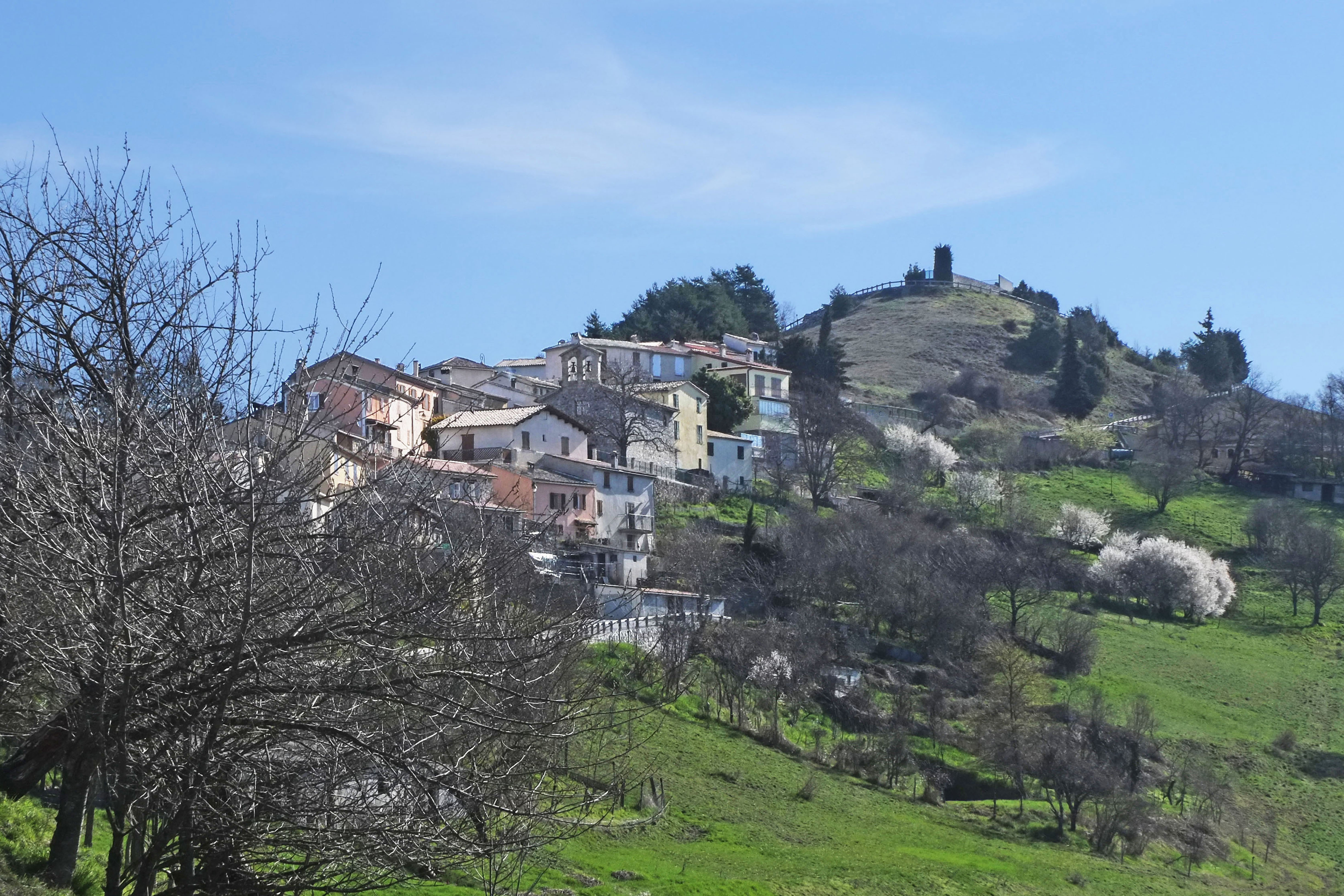 Vue sur le village de Saint-Antonin en venant du vallon de La Penne